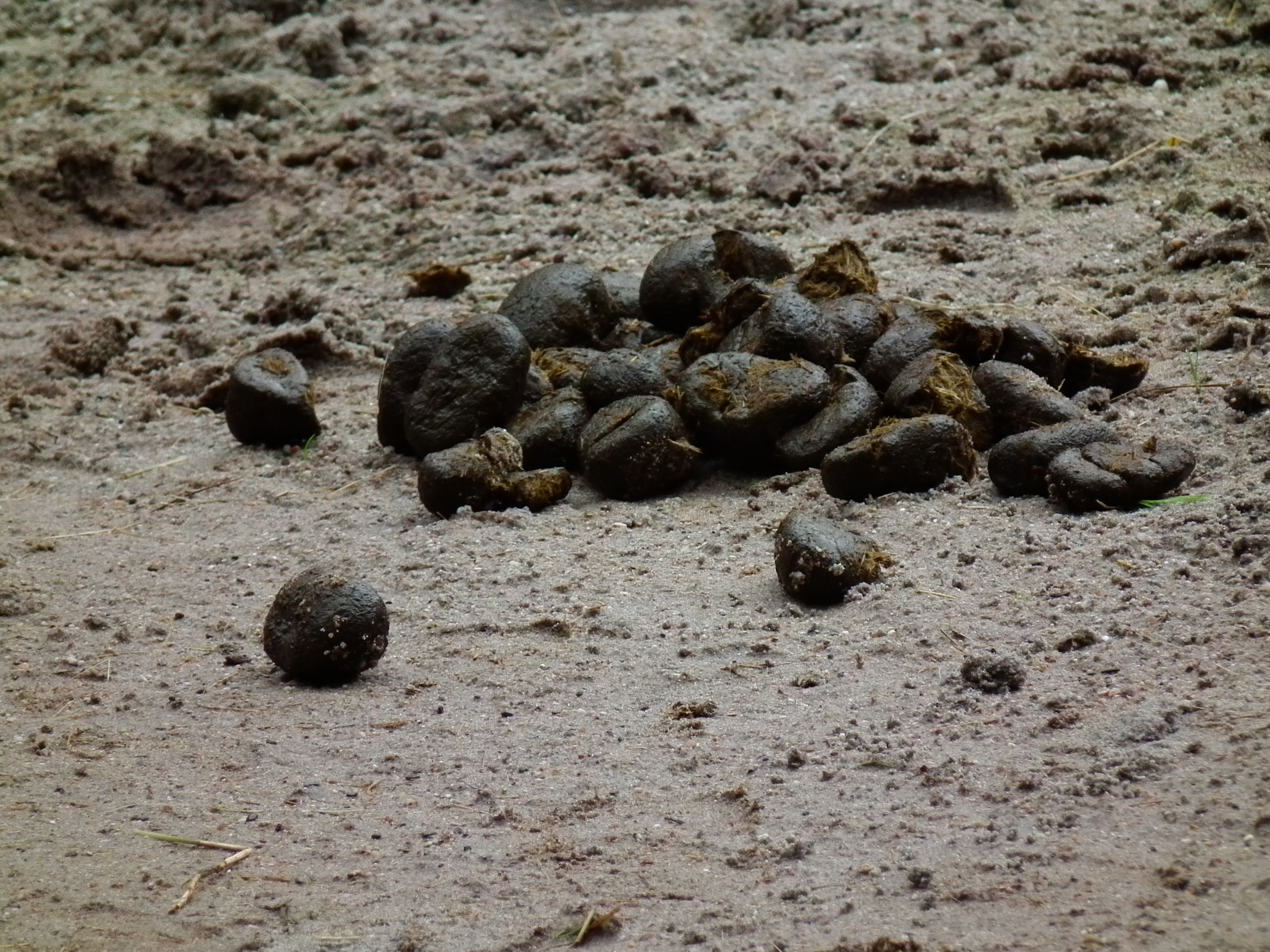 Kot von Böhm-Zebras (Equus quagga boehmi) im Vivarium Darmstadt (Hessen, Deutschland)